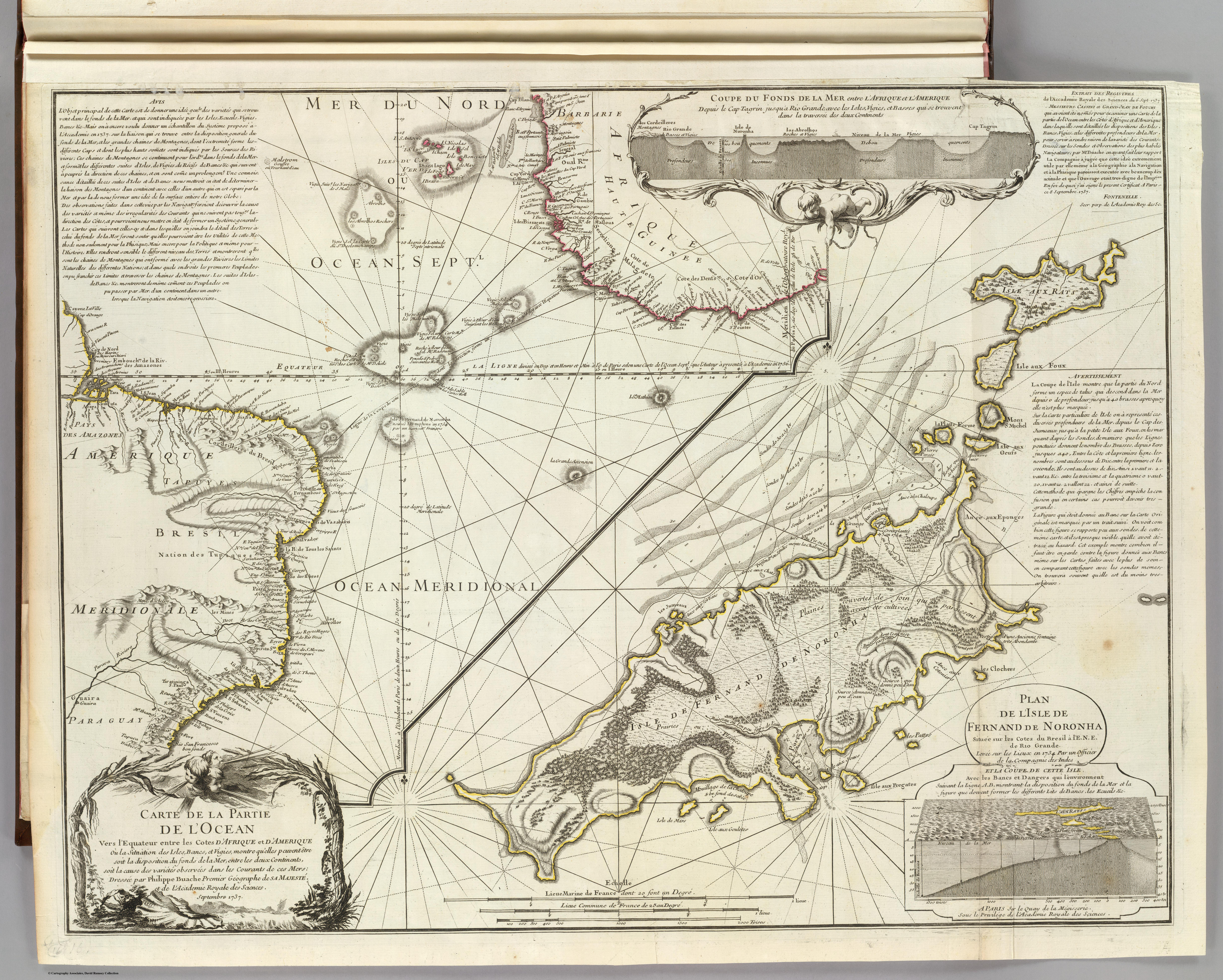 Les montagnes sous la mer Philippe Buache, Carte d'une partie de l'Océan vers l'Équateur entre les costes d'Afrique et d'Amérique... Paris, 1737. Carte gravée sur cuivre (63,5 x 48,3 cm) BNF, Cartes et Plans, SH Pf 165 Div 2 p 3D